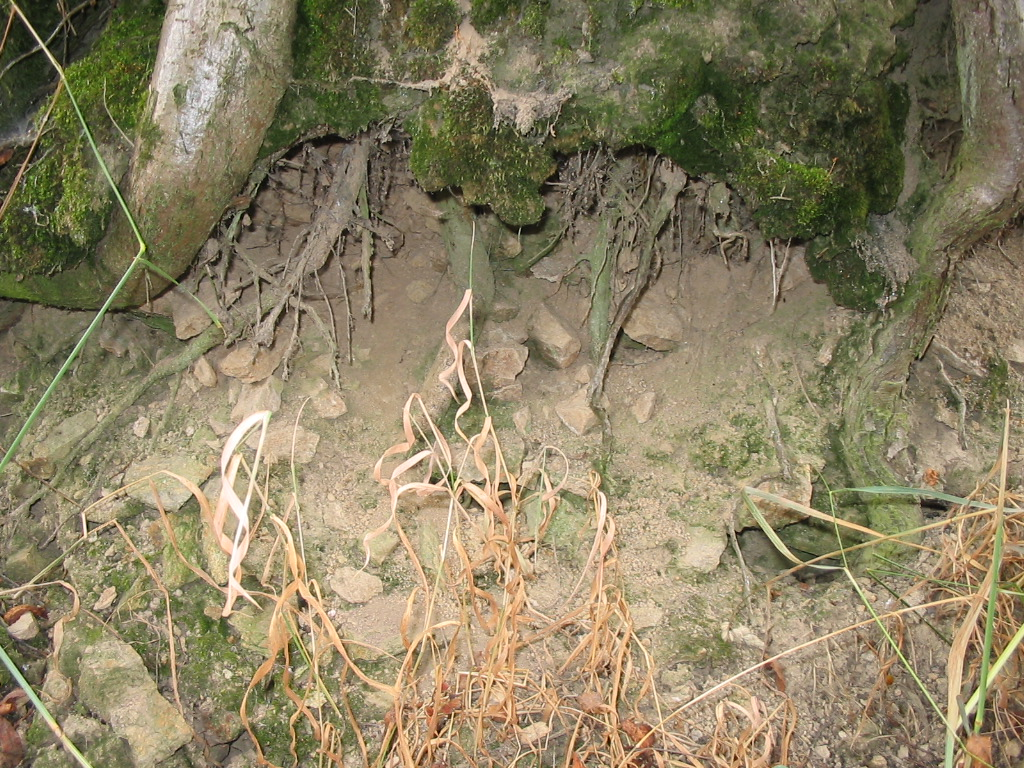 Příklad svahové eroze.